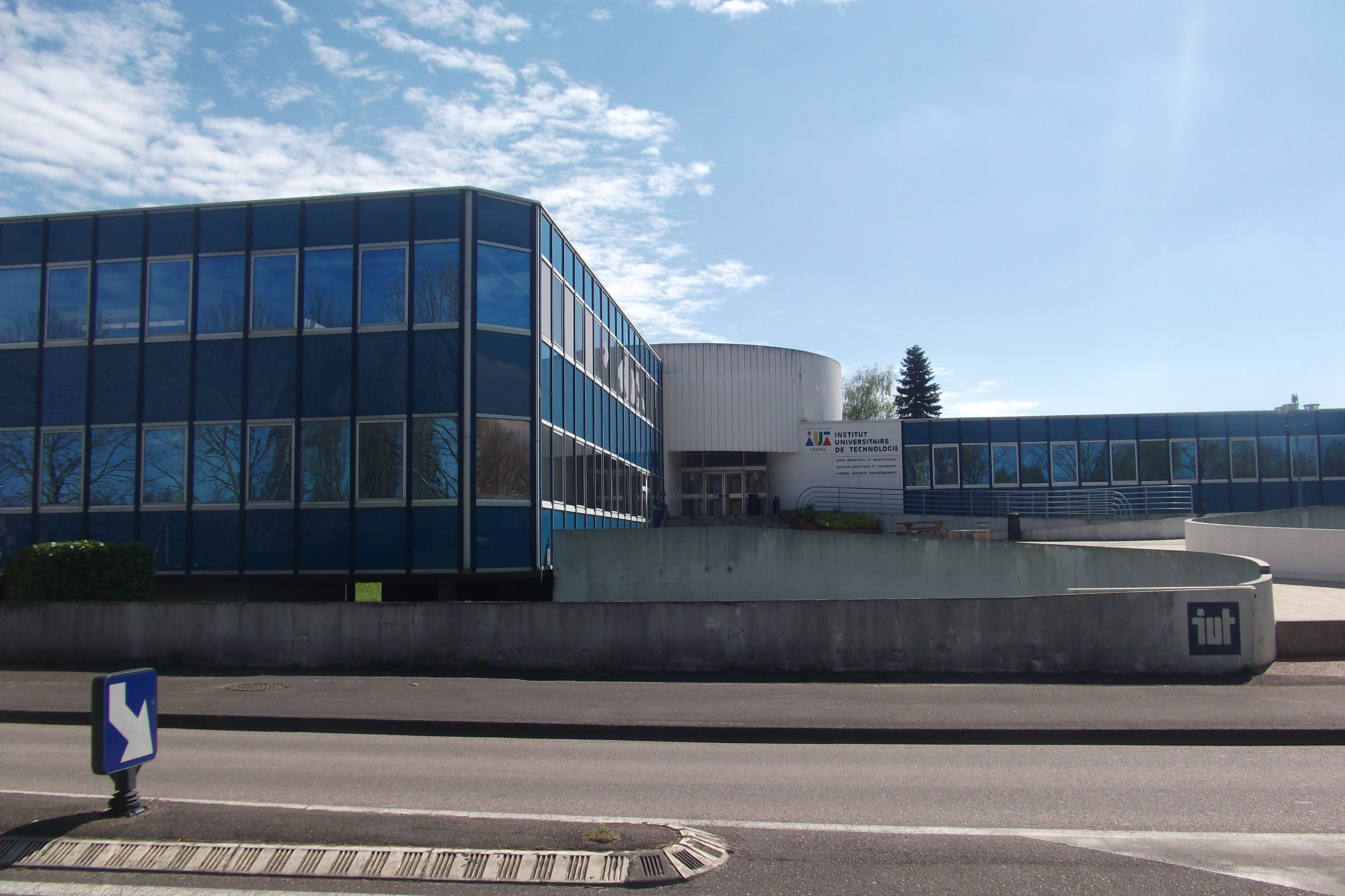 L'Institut universitaire de technologie de Vesoul (Haute-Saône, Franche-Comté)